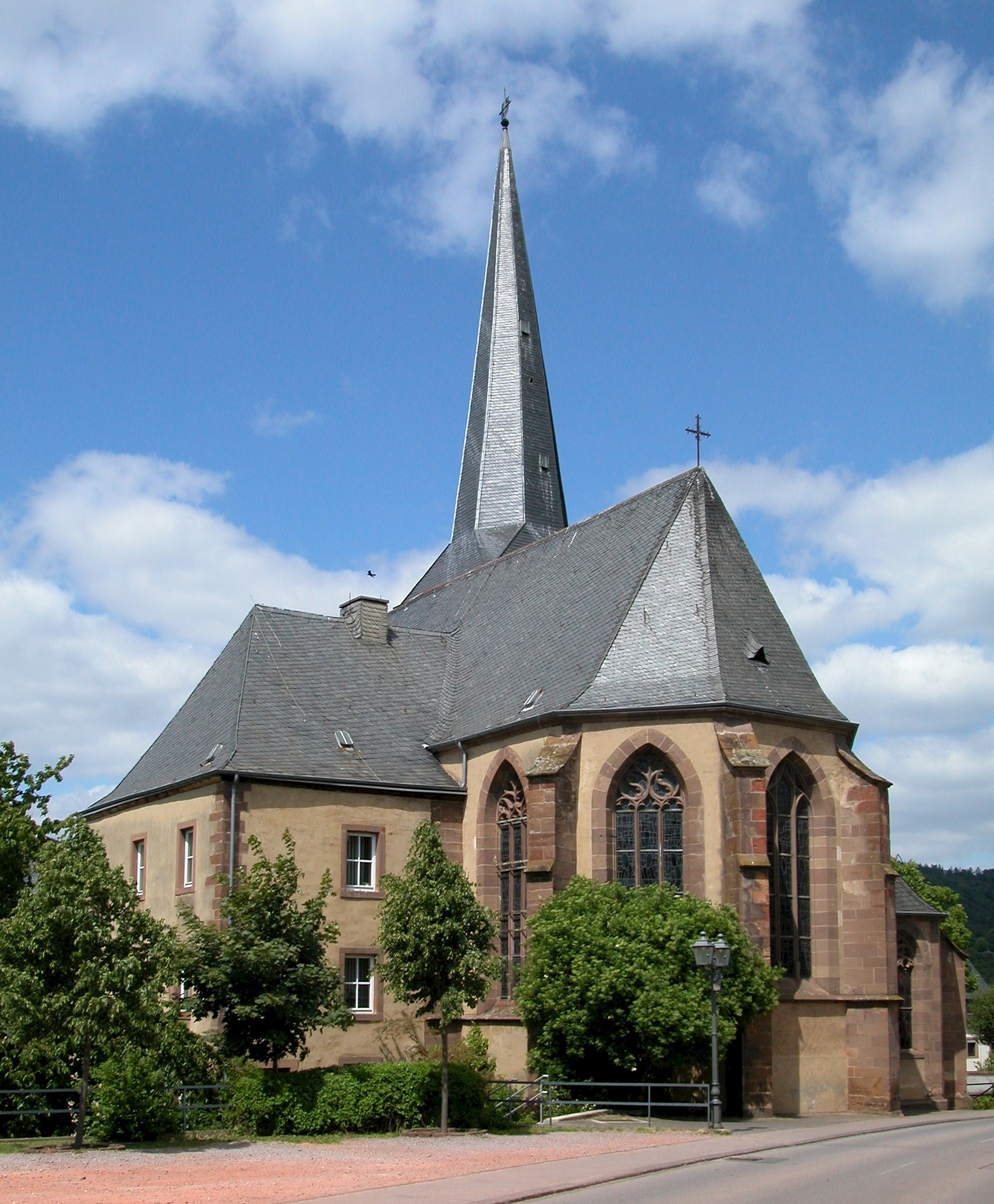 Pfarr- und Wallfahrtskirche St. Marien Saarburg-Beurig